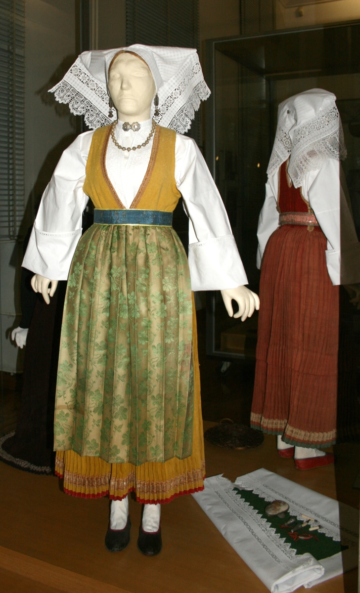 snimljeno tijekom Noći muzeja u Etnografskom muzeju u Zagrebu